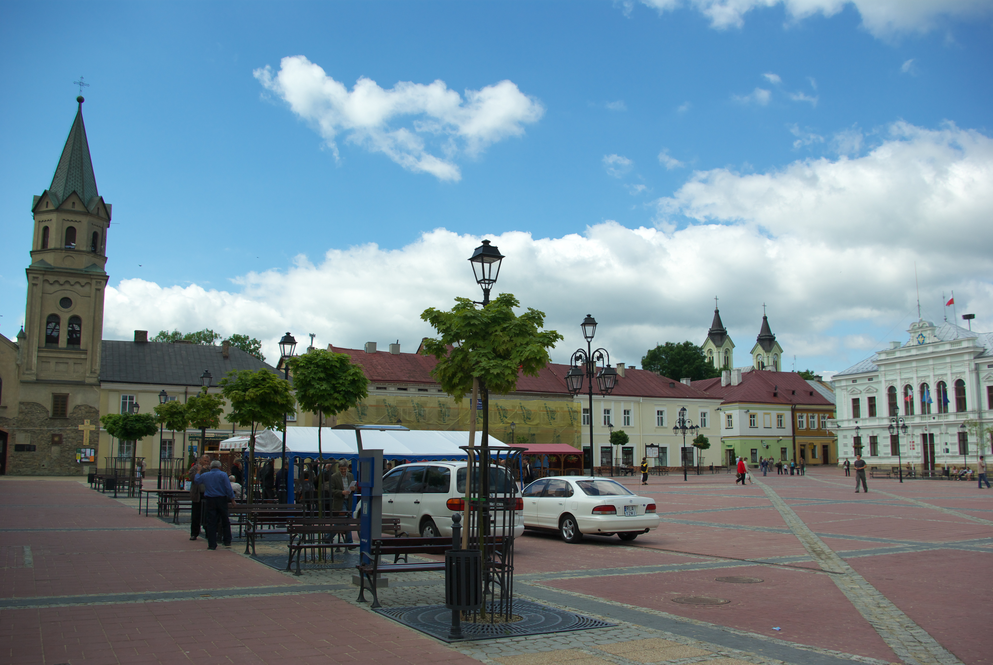 Rynek w Sanoku.